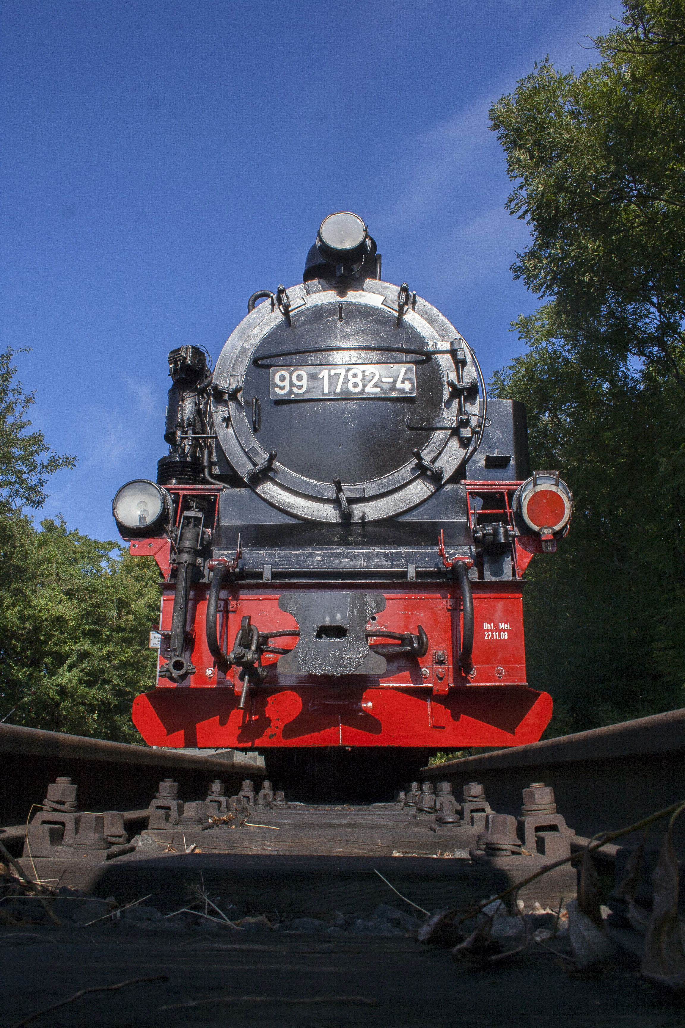 Rasender Roland, Putbus